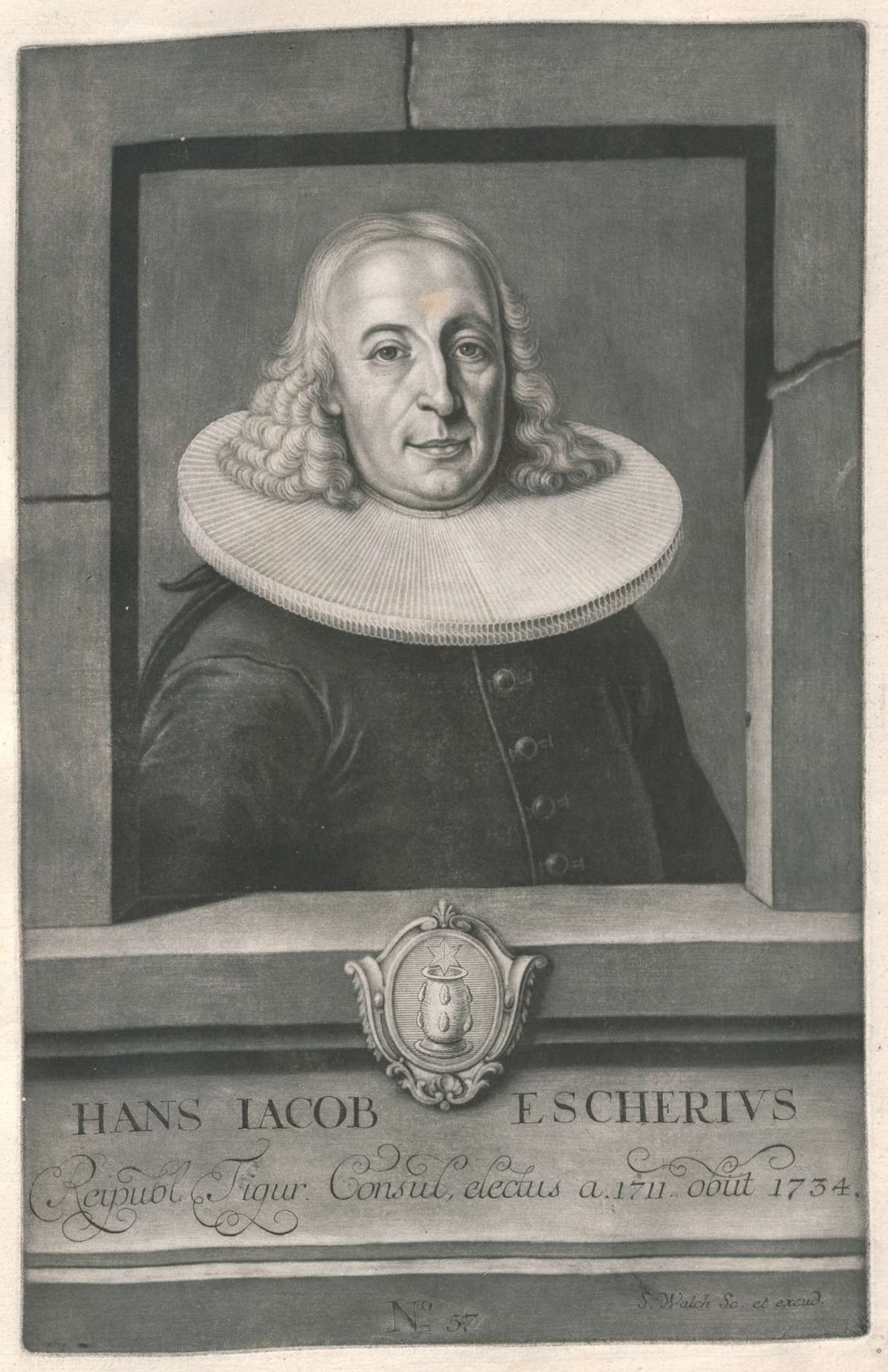 Sebastian Walch: Portraits aller Herren Burger-Meistern, Der Vortrefflichen Republique, Stadt und Vor-Orths Zürich Von dem 1336ten biß auf das 1742te Jahr. Kempten 1756. Kupferstiche von Sebastian Walch nach Vorlage von Johann Caspar Füssli. Tafel Nr. 57 Hans Jacob Escherius (Hans Jakob Escher)